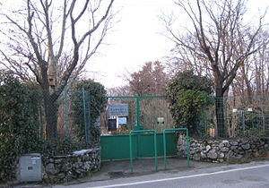 Casiana botanical garden entrance